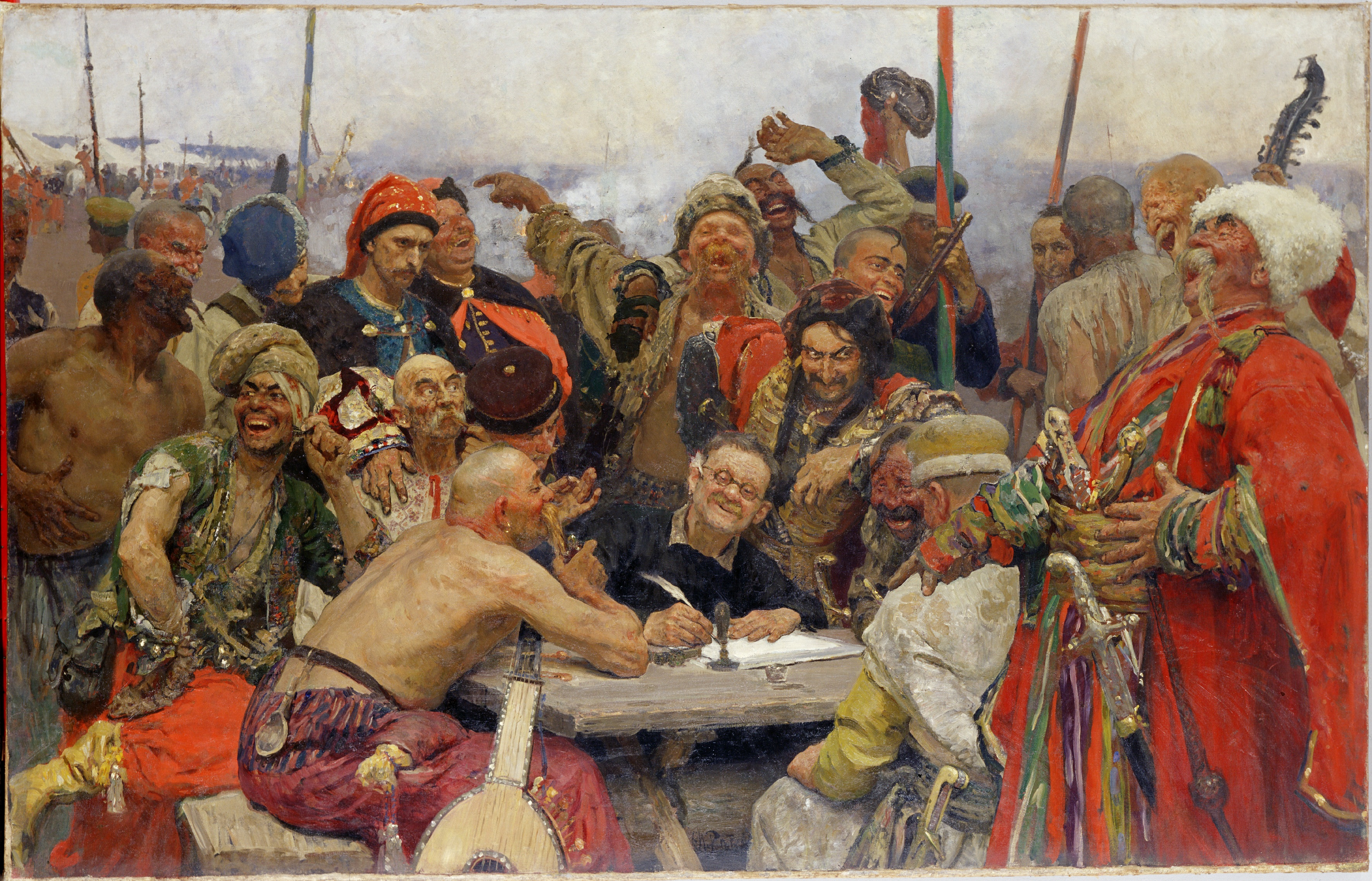 sketch